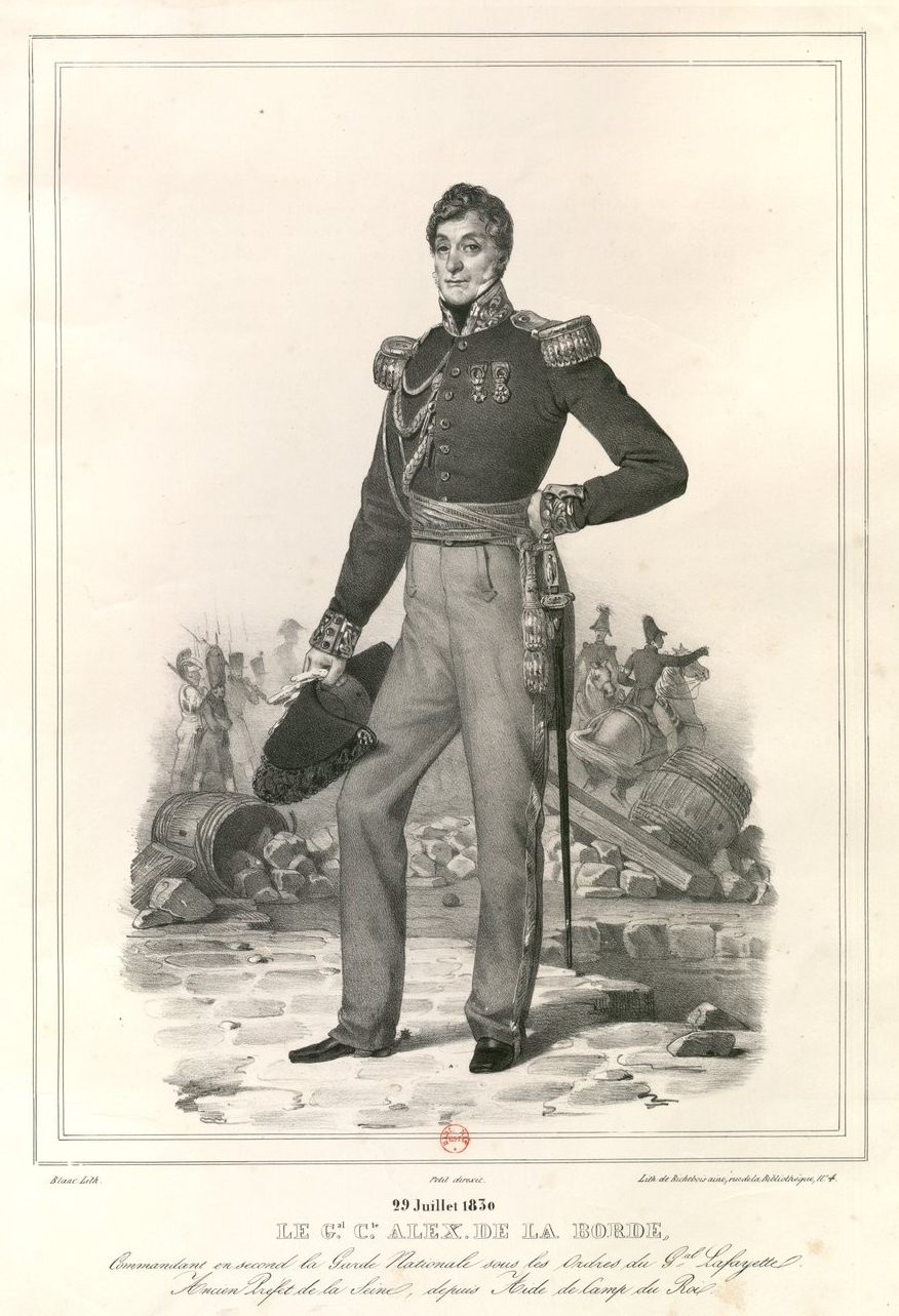 29 juillet 1830 Le G.al C.te Alex. De La Borde Commandant en second de la Garde Nationale sous les Ordres du G.al Lafayette